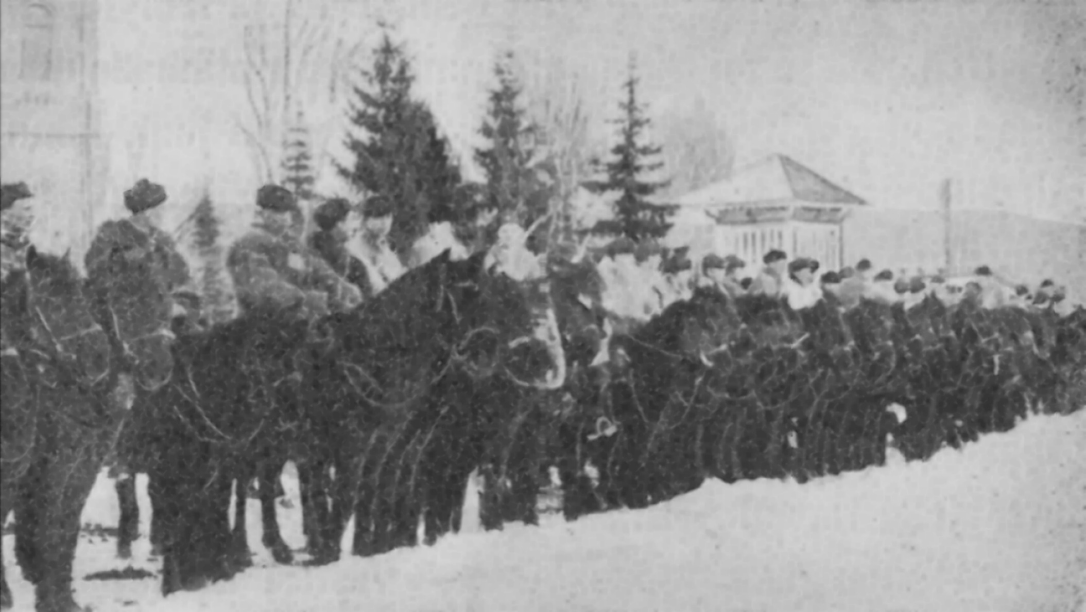 Description